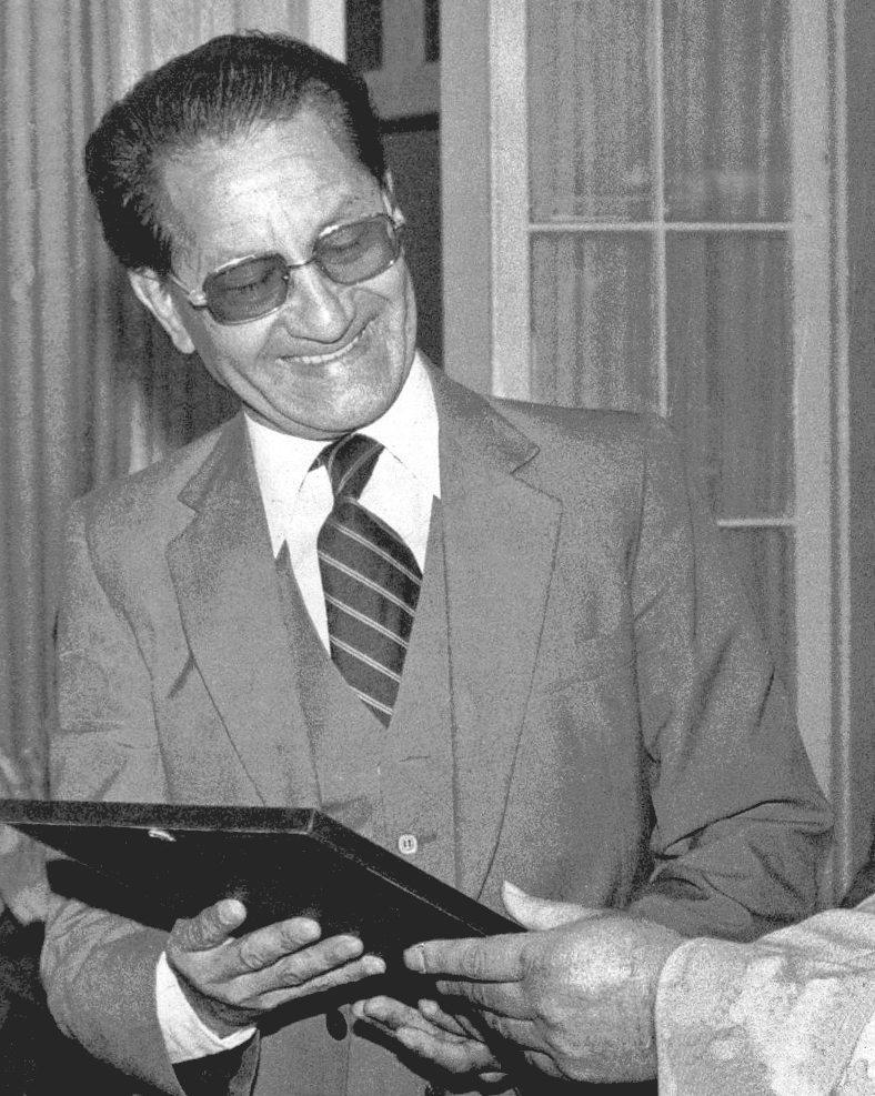 Premio Mejor Periodista 1981